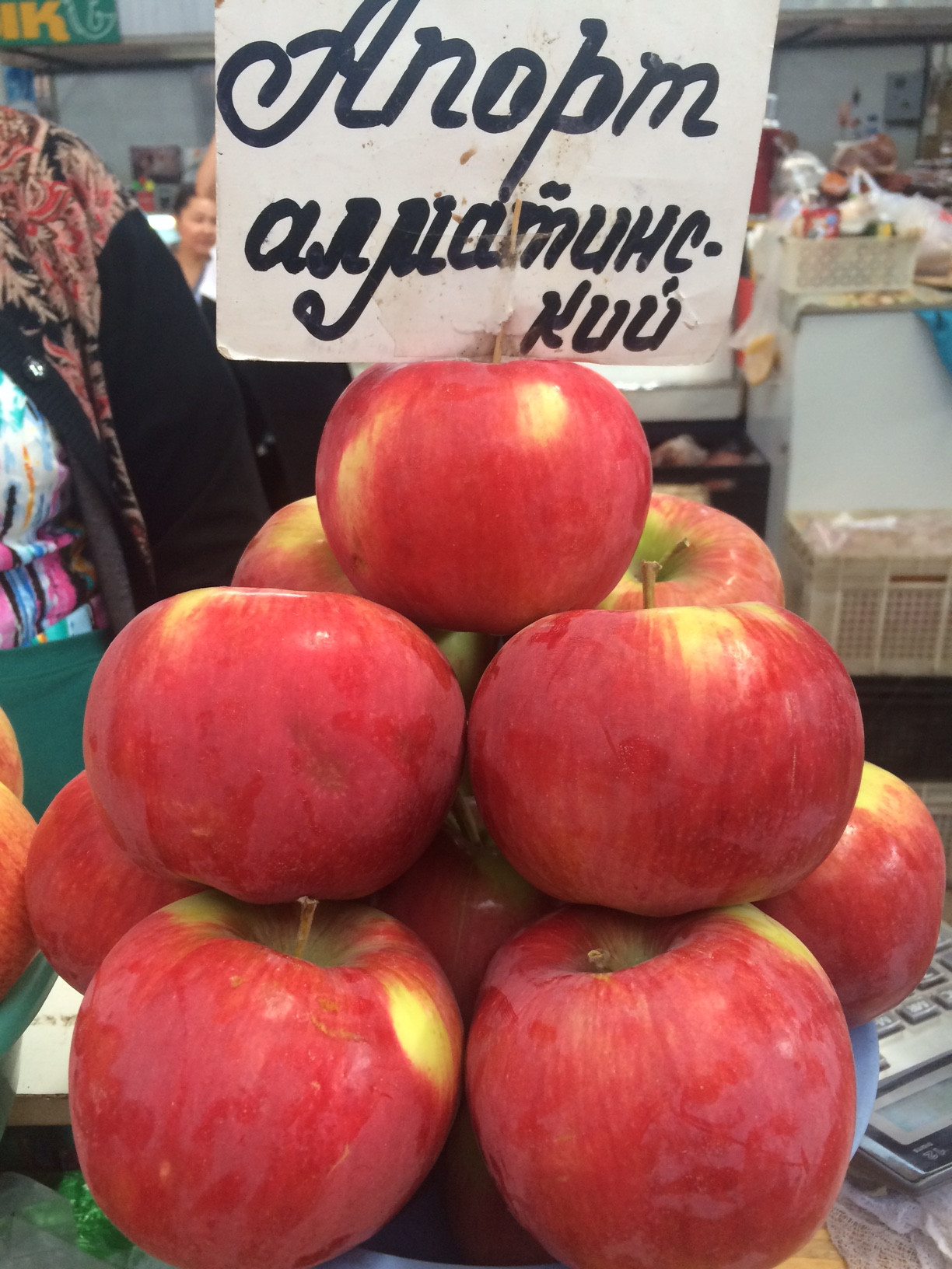 Алматинский апорт